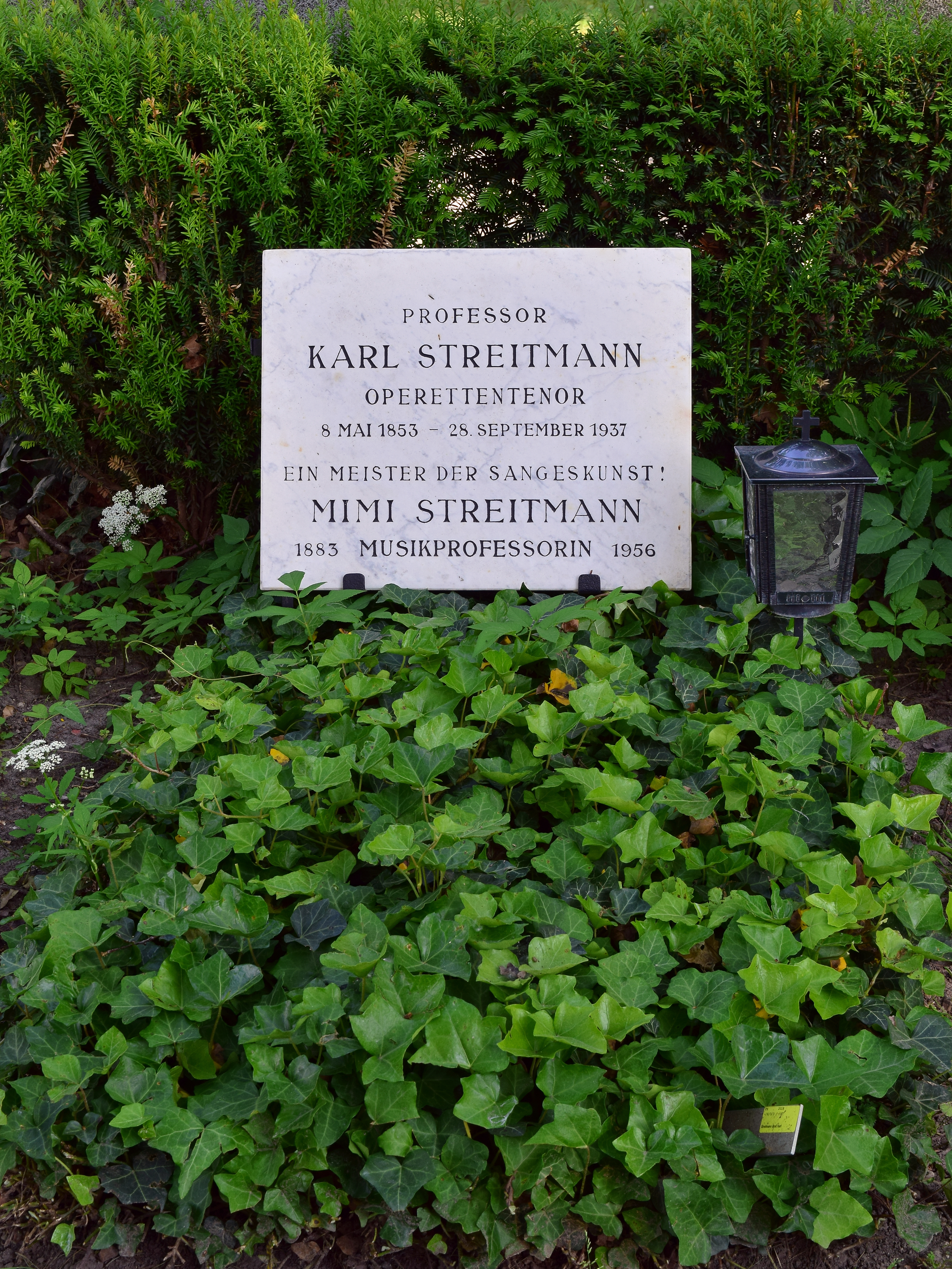 Ehrenhalber gewidmetes Grab von Karl Streitmann auf dem Urnenhain der Feuerhalle Simmering, Abt. 6, Ring 3, Gruppe 3, Nr. 47